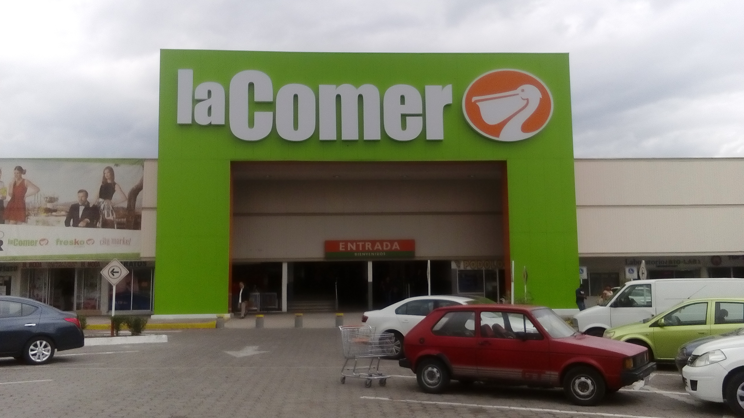 Fachada principal de tienda "La Comer". Sucursal ubicada en Querétaro, Querétaro.